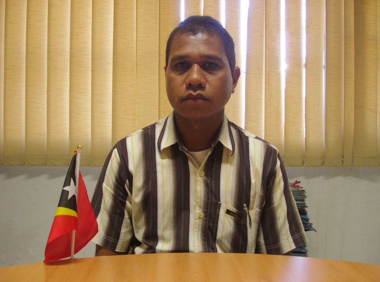 Cecilio Soares, Administrator des Subdistrikts Luro